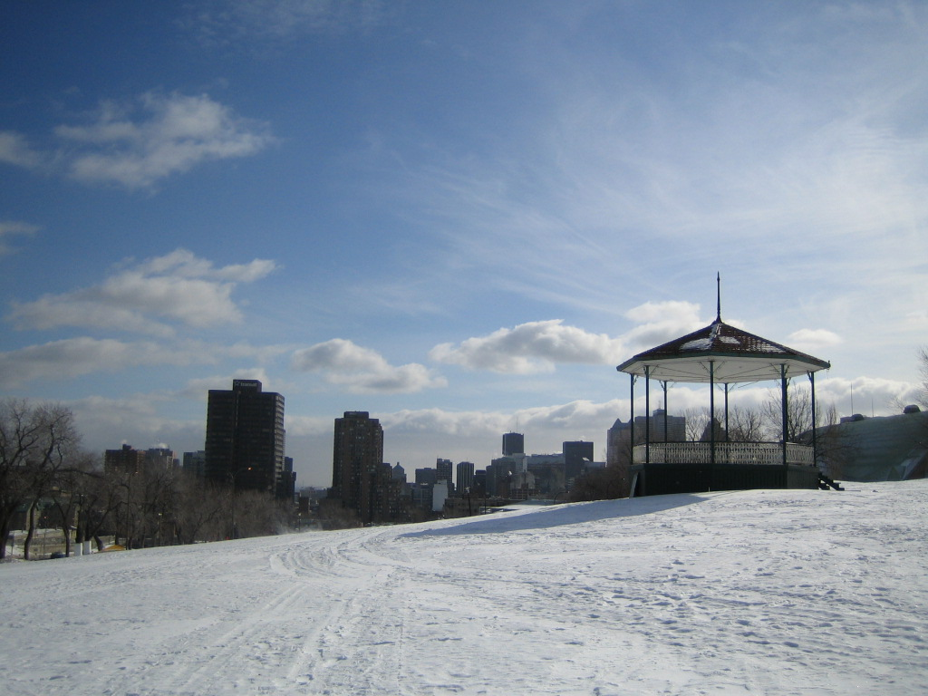 Parc du Mont-Royal, Montréal, l'hiver. Vue du gazebo avec le centre-ville en arrière-plan. La montagne est vers la droite de l'image.